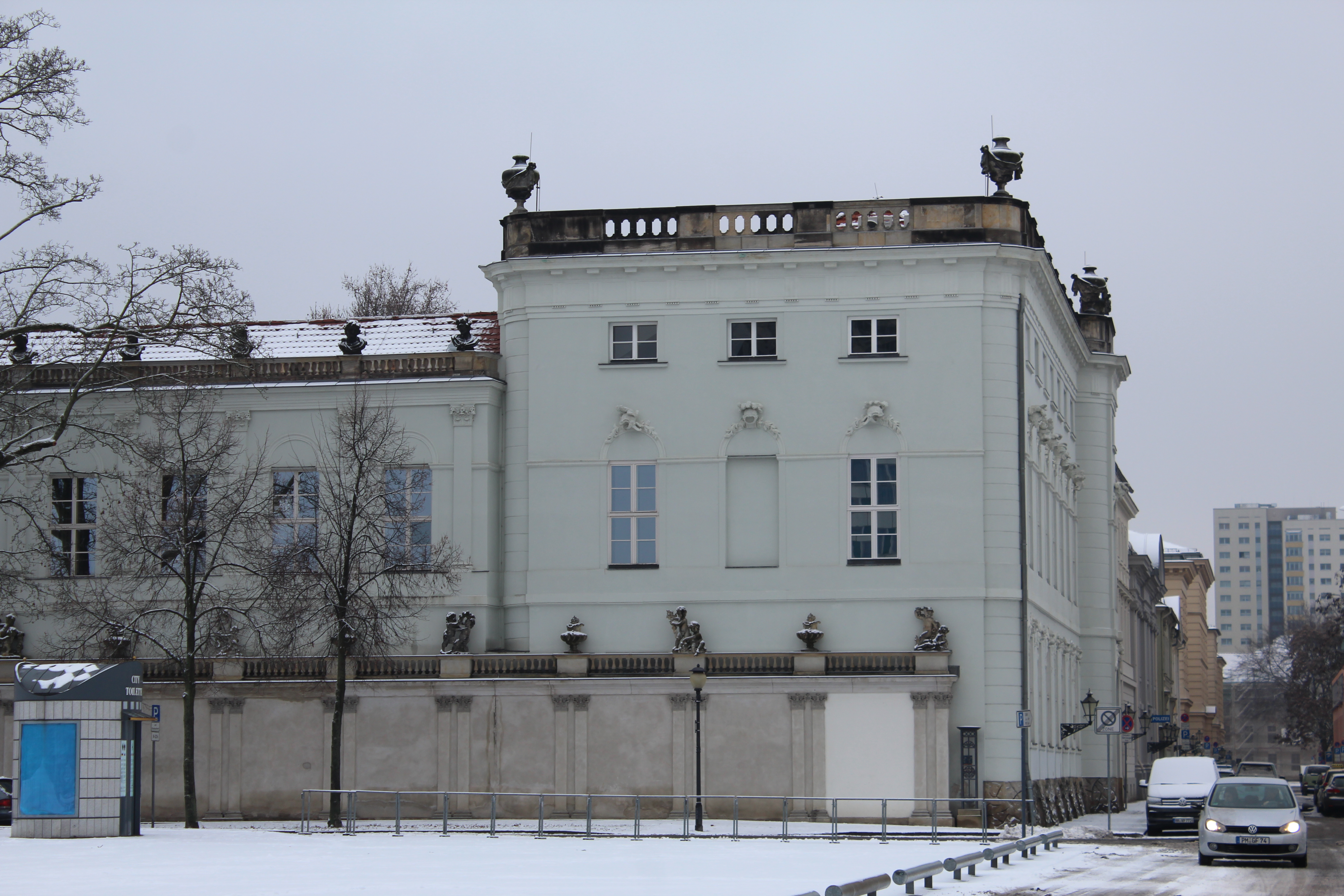 Denkmalgeschütztes Gebäude, Kommandantur, 1752, Architekt Georg Wenzeslaus von Knobelsdorff, Schlossstr, Henning-von-Tresckow-Straße 13; sowie Abschnitt der 1745 von Knobelsdorff entworfenen Begrenzungsmauer des Lustgartens, seit 1809 Regierungsgebäude. Dreigeschossig mit flacherem, den Lustgarten begleitendem Nebenflügel, urspr. Galerie. Die asymmetrischen Fassaden mit vorgezogener Portalachse und gelenkartig gerundeten Ecken haben eine Balustrade mit Vasen von Johann Gottlieb Heymüller. Über den Fenstern befinden sich Löwenfelldraperien und Helmzier von M. Müller und C. J. Sartori in Anlehnung an Schlüters Berliner Zeughausdekor. Am Seitenflügel und südl. anschließend ist ein Abschnitt der 1745 von Knobelsdorff entworfenen Begrenzungsmauer des Lustgartens mit Pilastergliederung entsprechend der Schlosskolonnaden; auf dem Gebälk Vasen und spielende Putten aus der Werkstatt Friedrich Christian Glume, größtenteils Kopien.